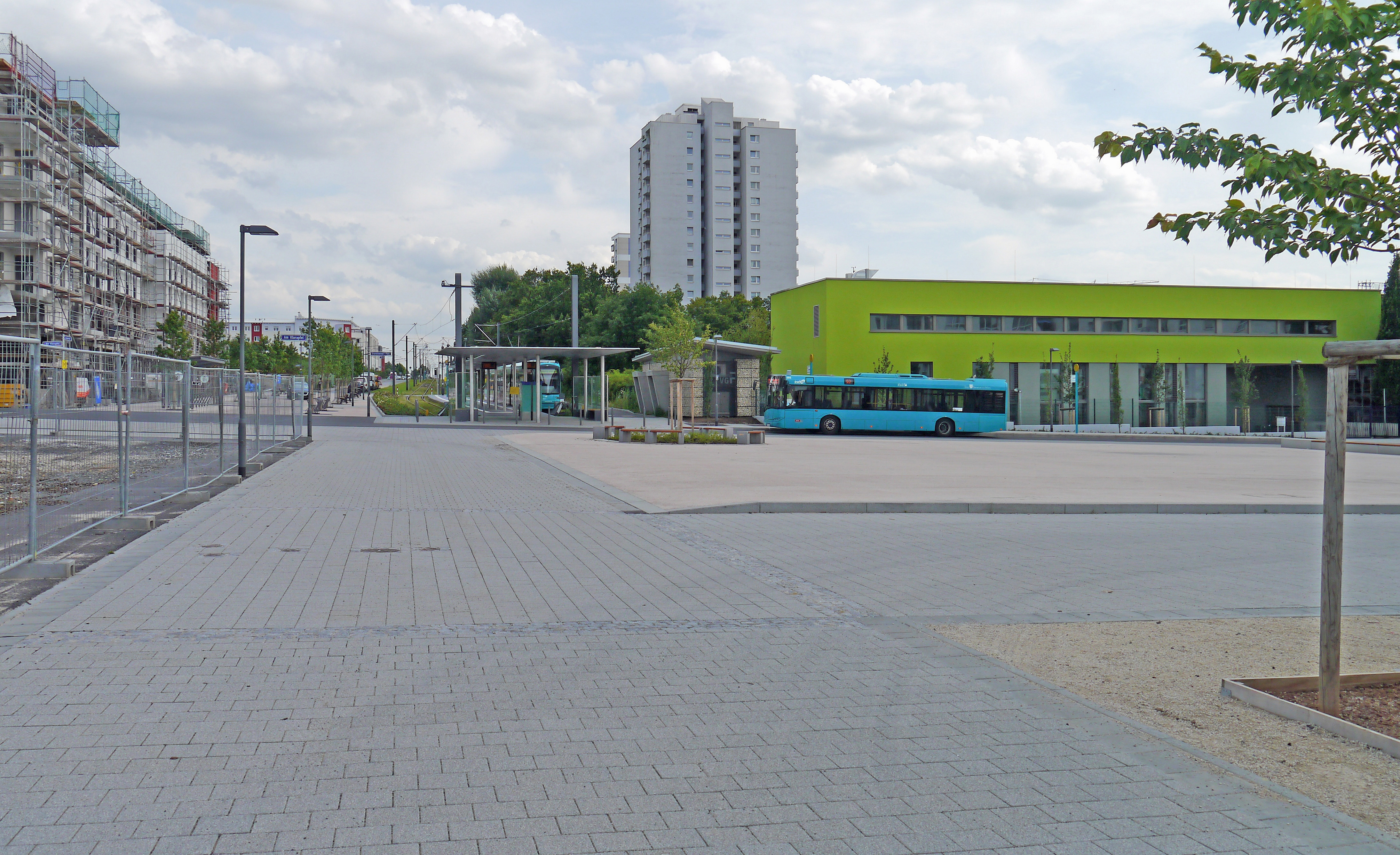 Gravensteiner Platz, 2012 in Frankfurt-Preungesheim: Endstation der Tram Linie 18 und der Bus-Linie 63.